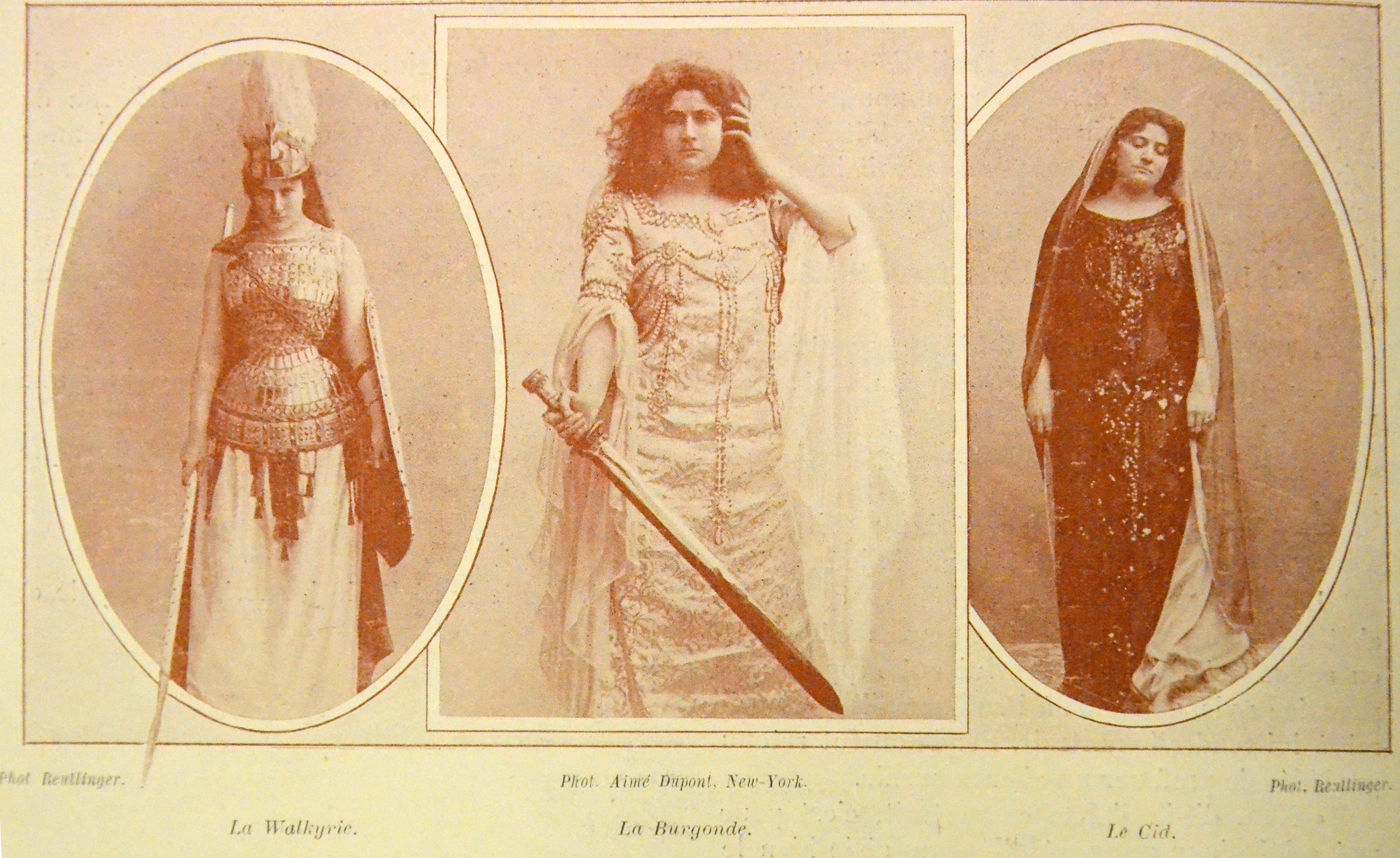 Portrait triple de Lucienne Bréval, commédienne française (photos faites avant 1902)